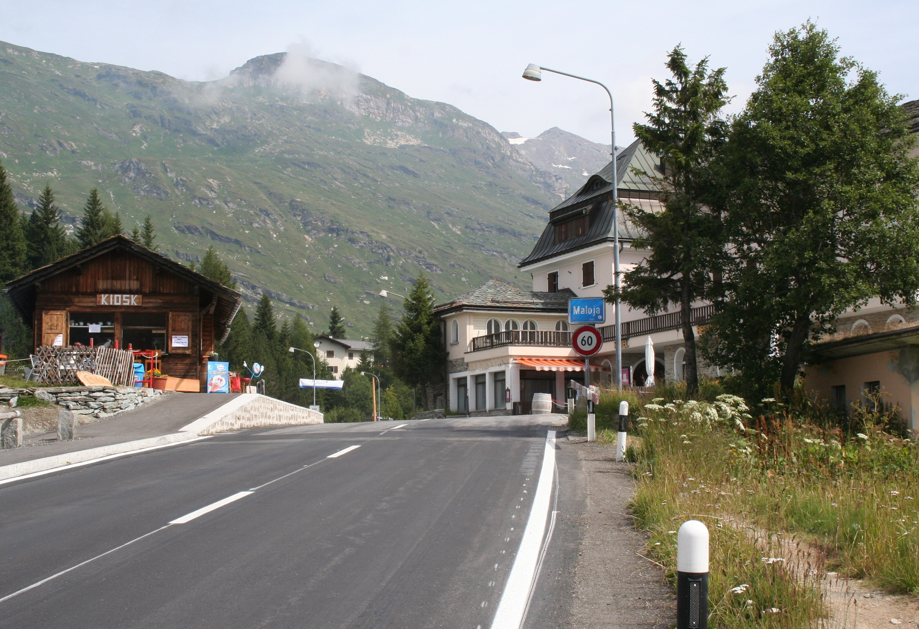 Malojapass Passhöhe